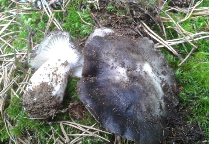 Bolet Hygrophorus Marzuolus, Marçot